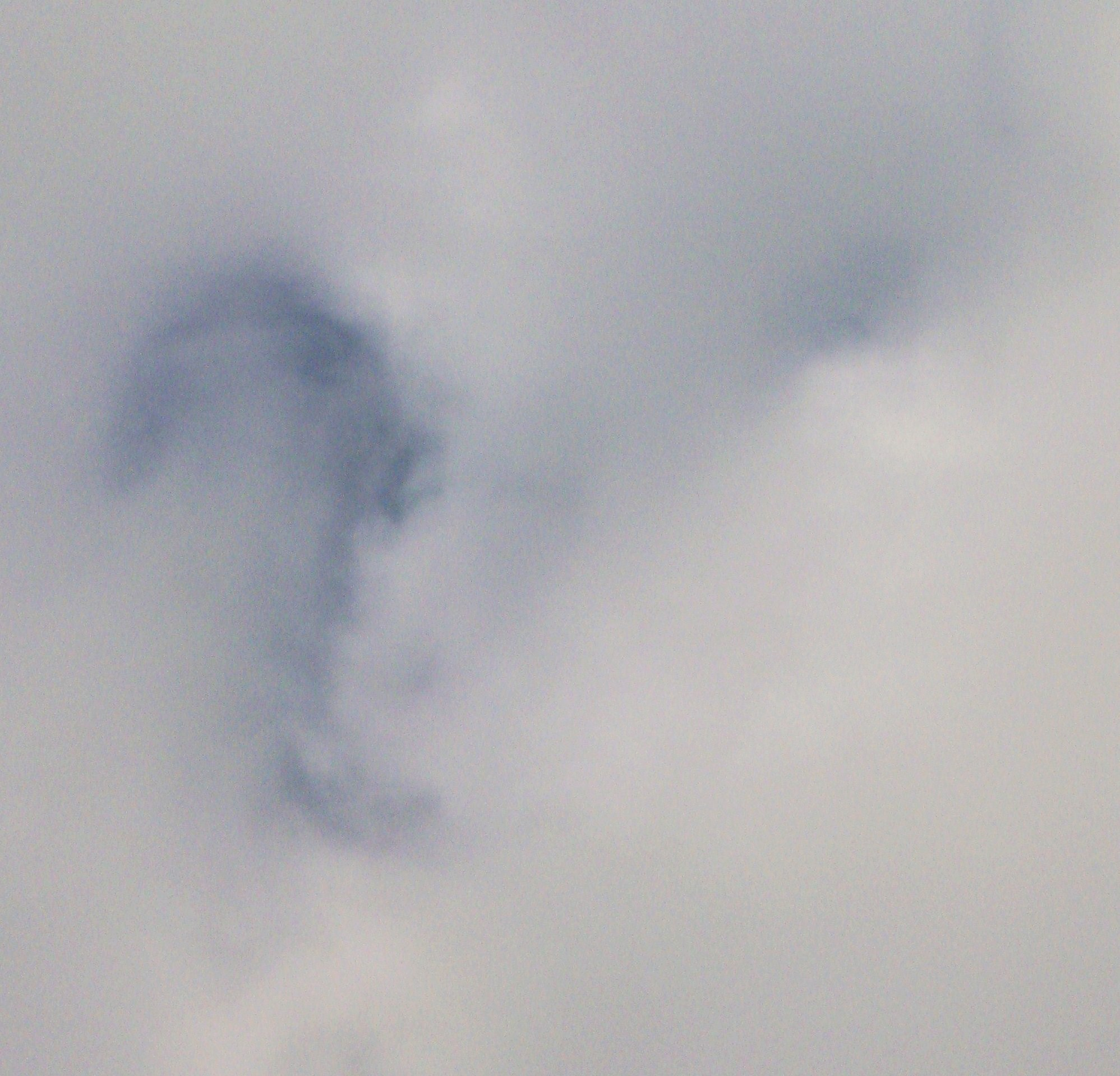 Nuage au-dessus de l'Ile de Ré (17000)